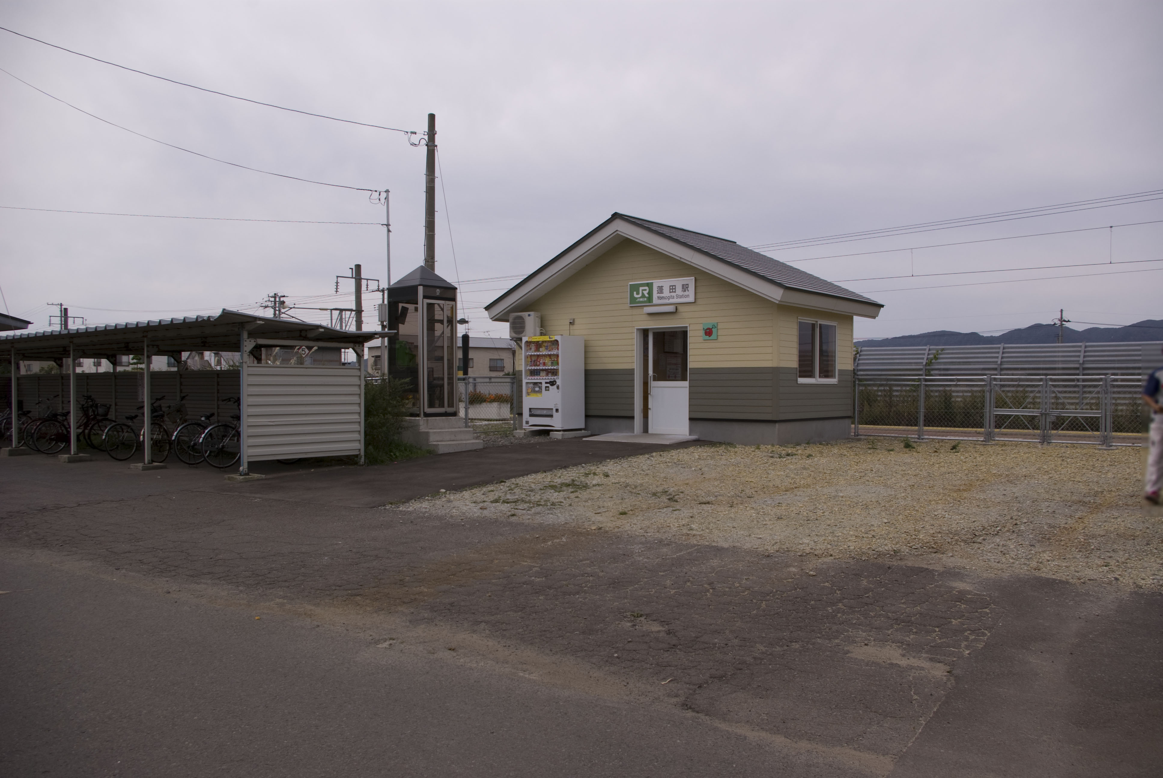 東日本旅客鉄道株式会社津軽線蓬田駅